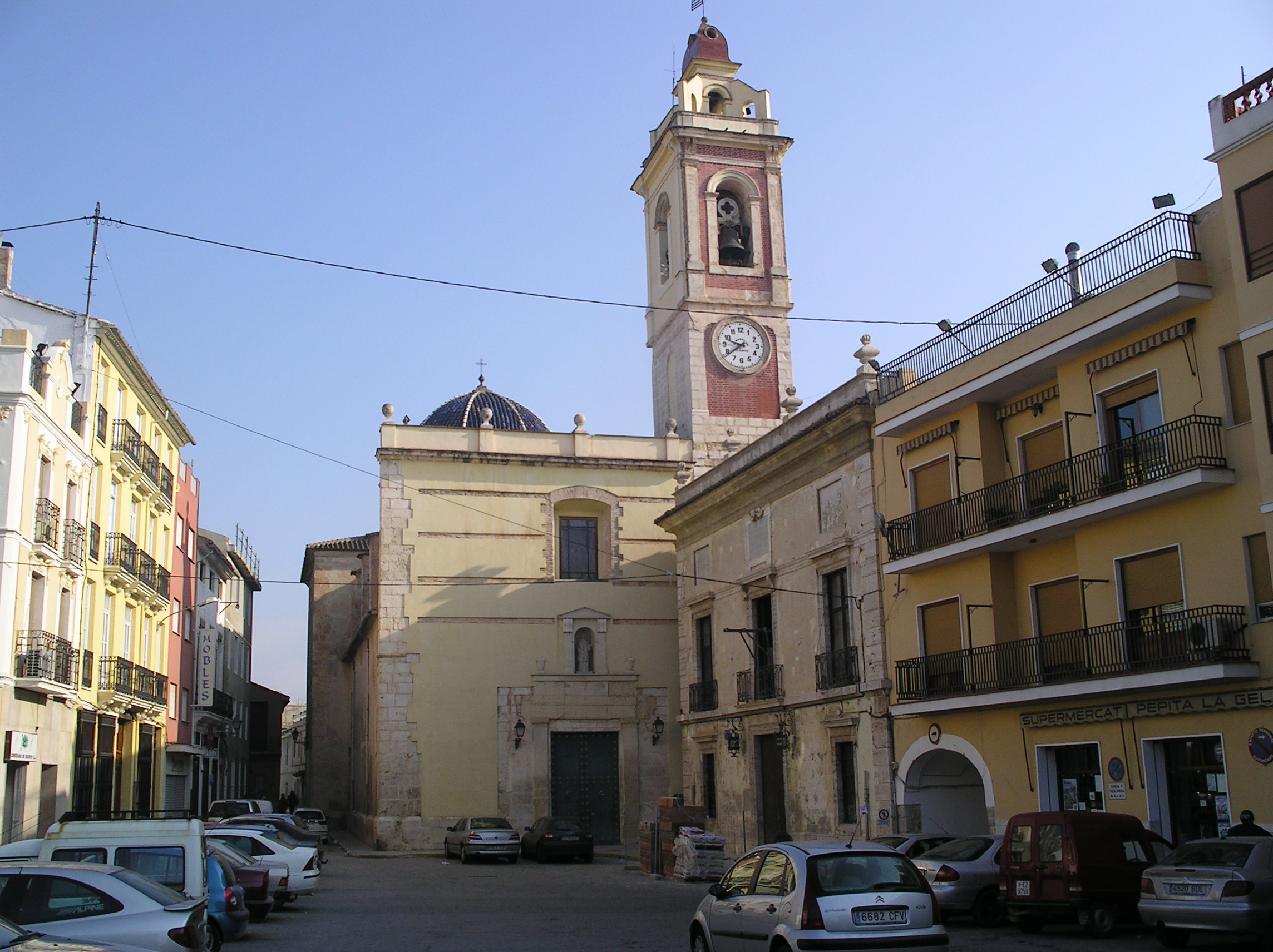 Vista de la plaza del Ayuntamiento de Alberique, Valencia, España, con la Iglesia de San Lorenzo.